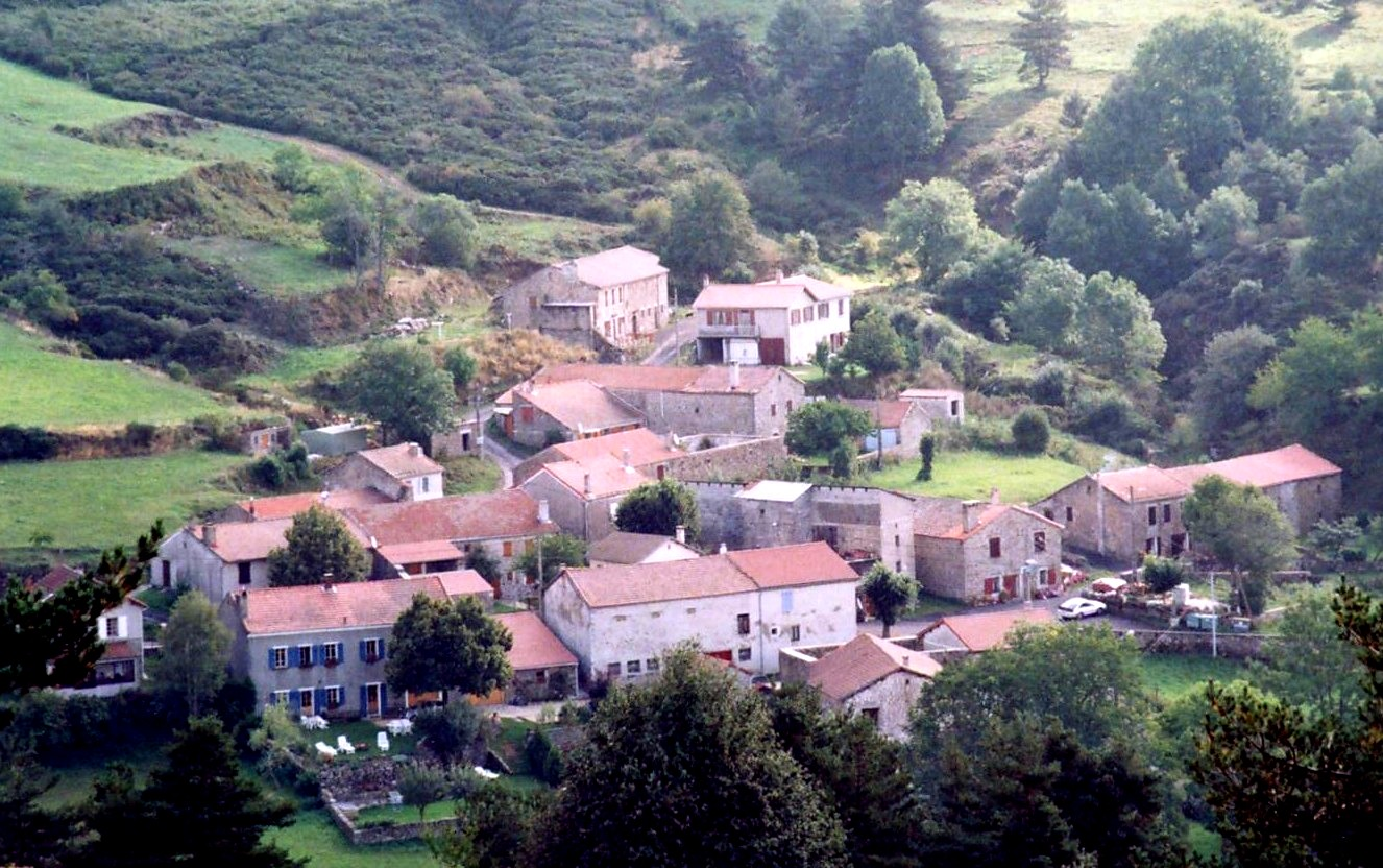 Le Cros, 07590 Saint-Etienne-de-Lugdarès